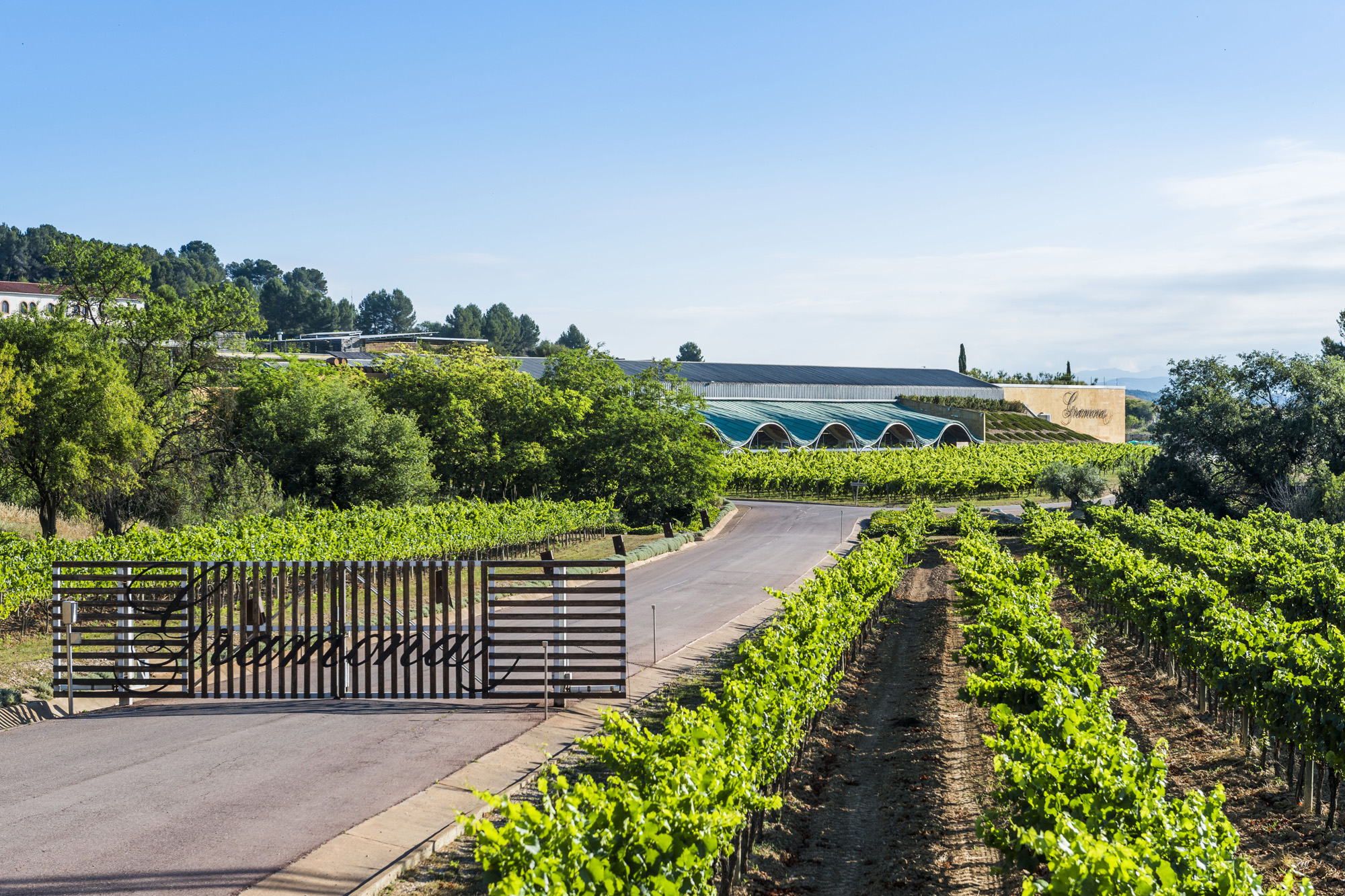 Entrada al Celler Batlle de Gramona